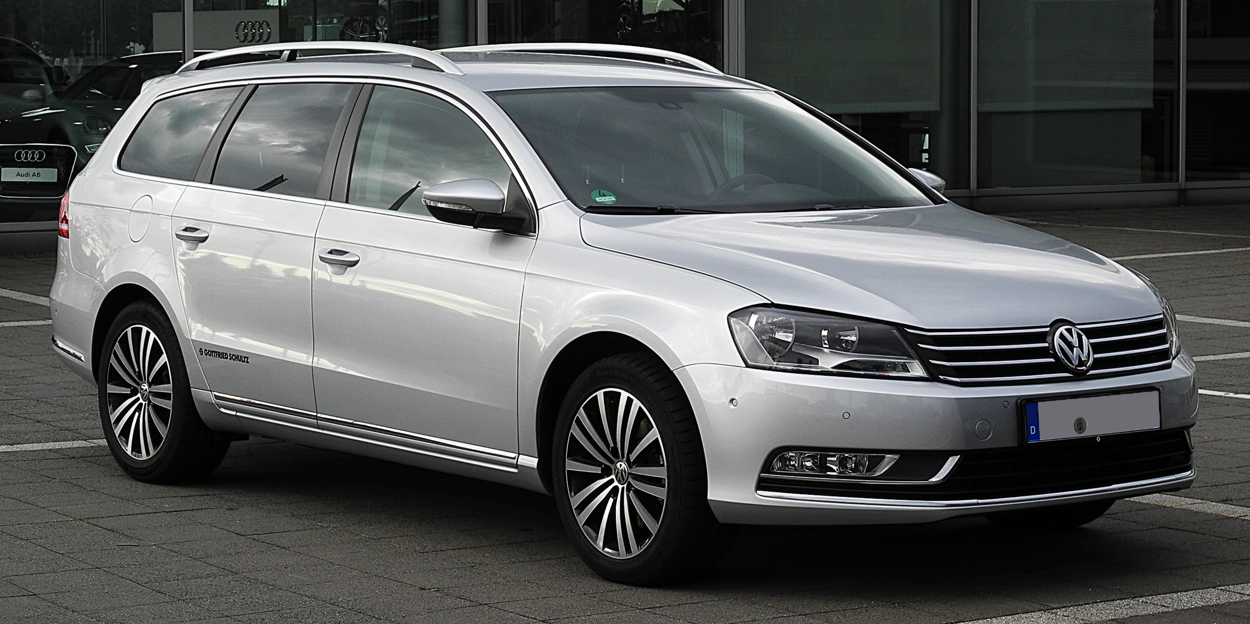 VW Passat Variant (B7)